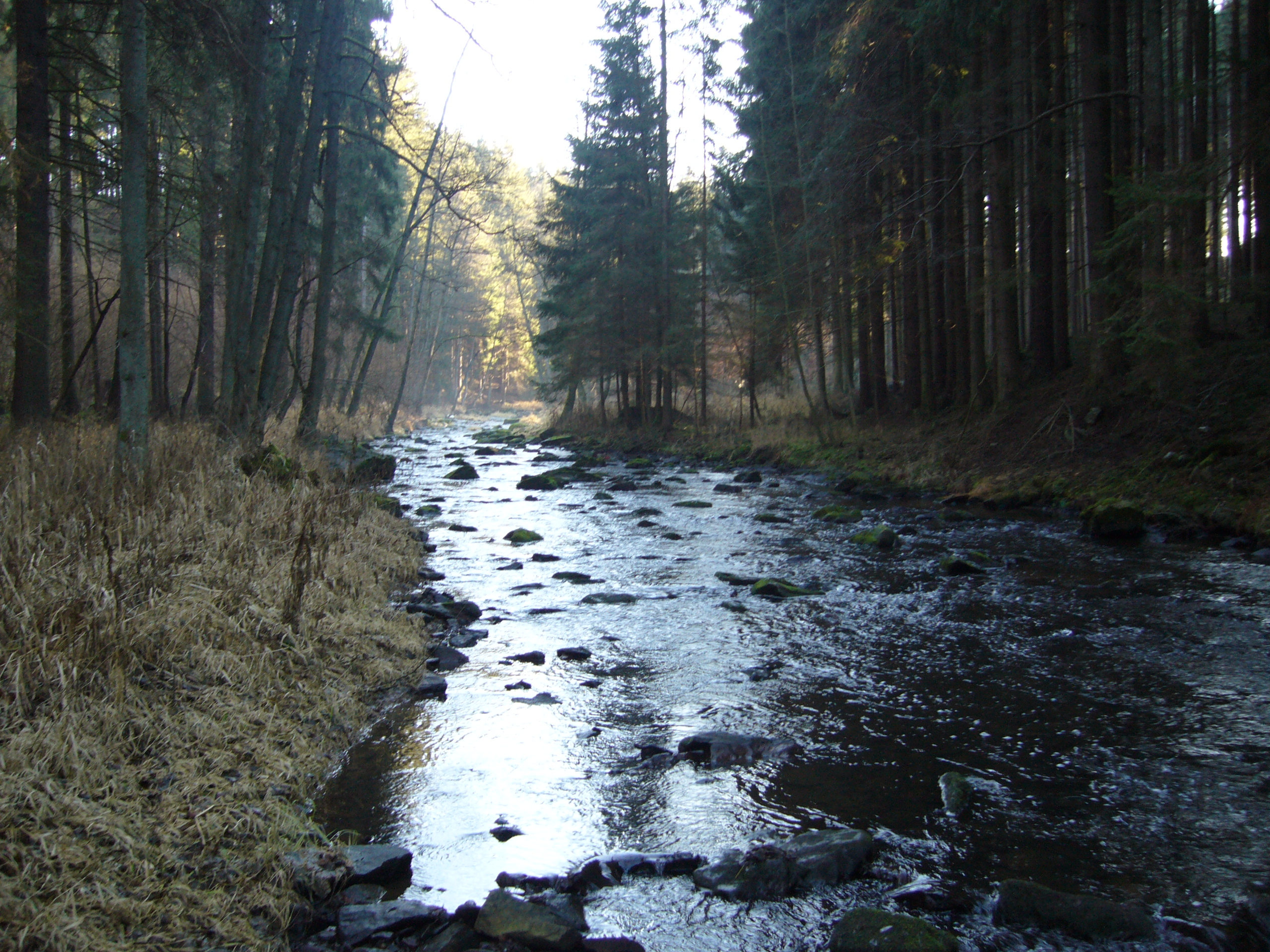 Žirovnický potok